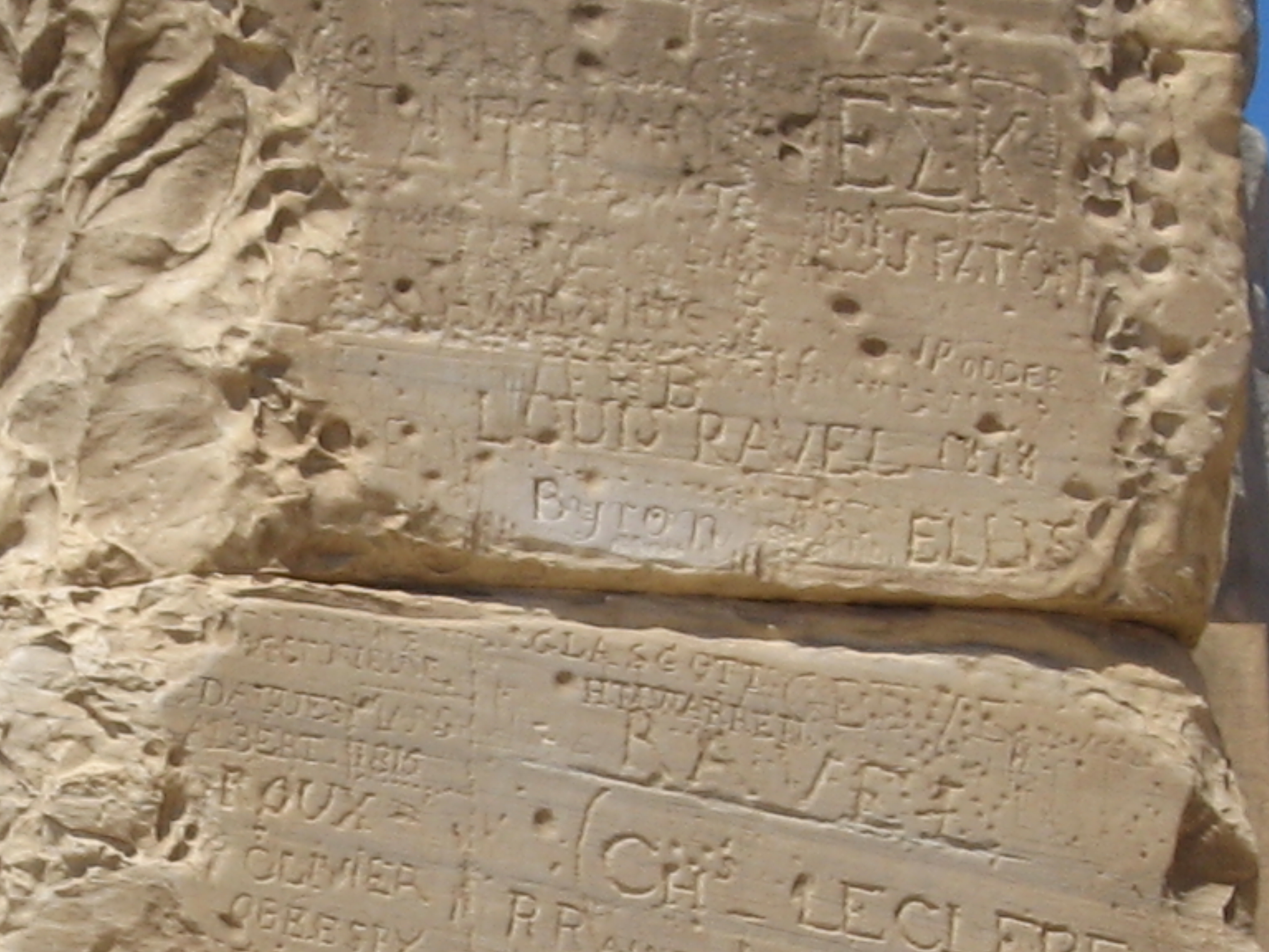 Inscripción de Lord Byron en la que se aprecia su nombre grabado. Templo de Poseidón del Cabo Sunión, en el Ática, Grecia .